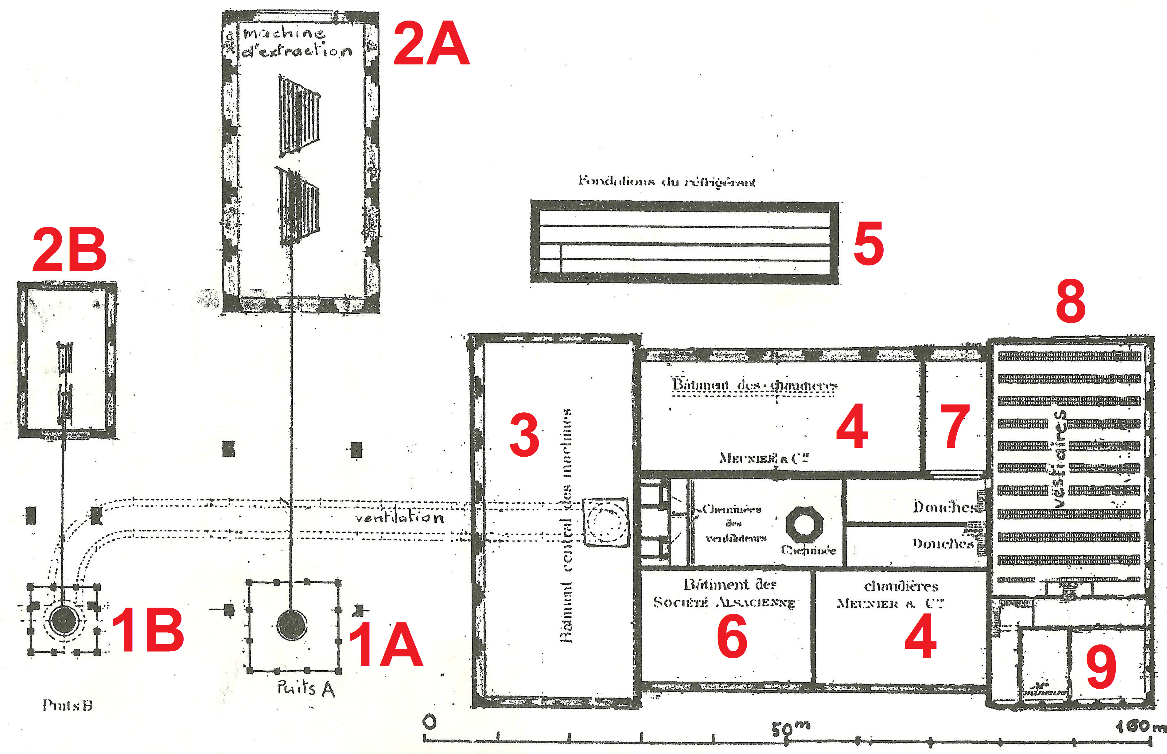 Lageplan der Zeche Arthur de Buyer.